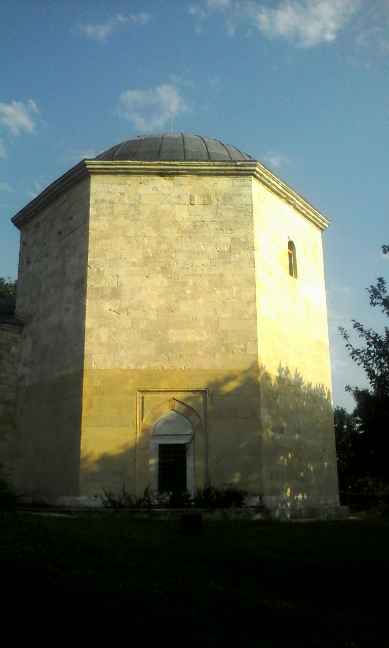 Вид на тюрбе с августа 2018 г.